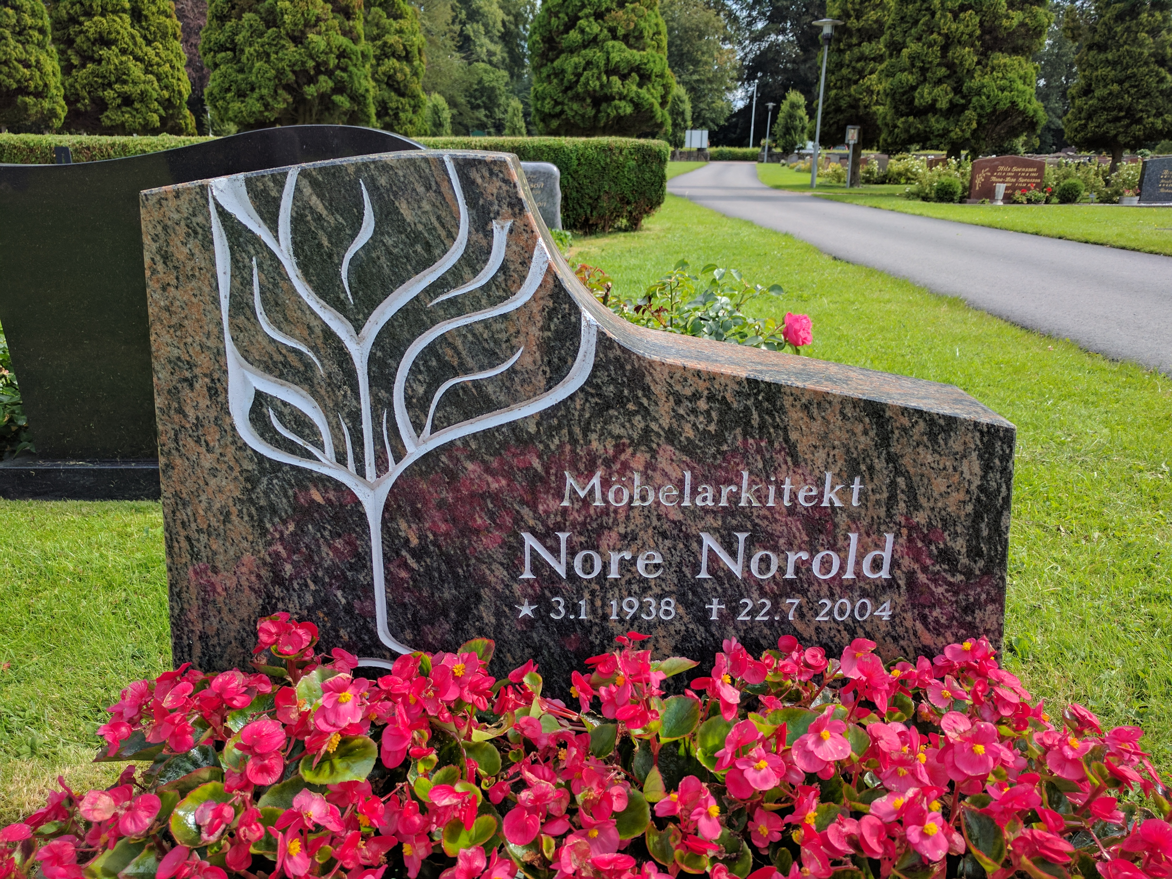 Nore Norolds grav på Laholms kyrkogård. På gravstenen tituleras han "möbelarkitekt".